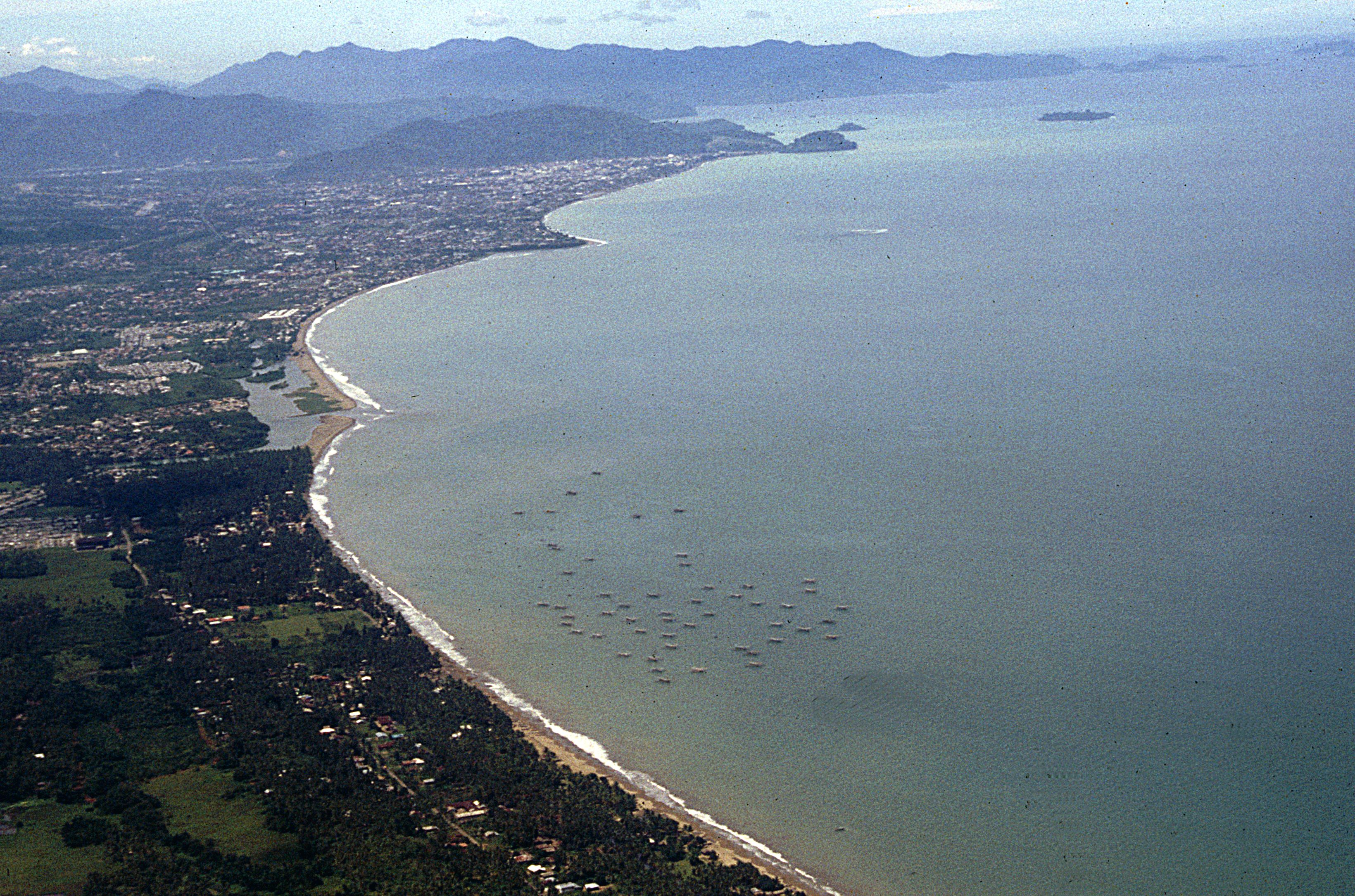 West Sumatra: Padang (Flugbild)